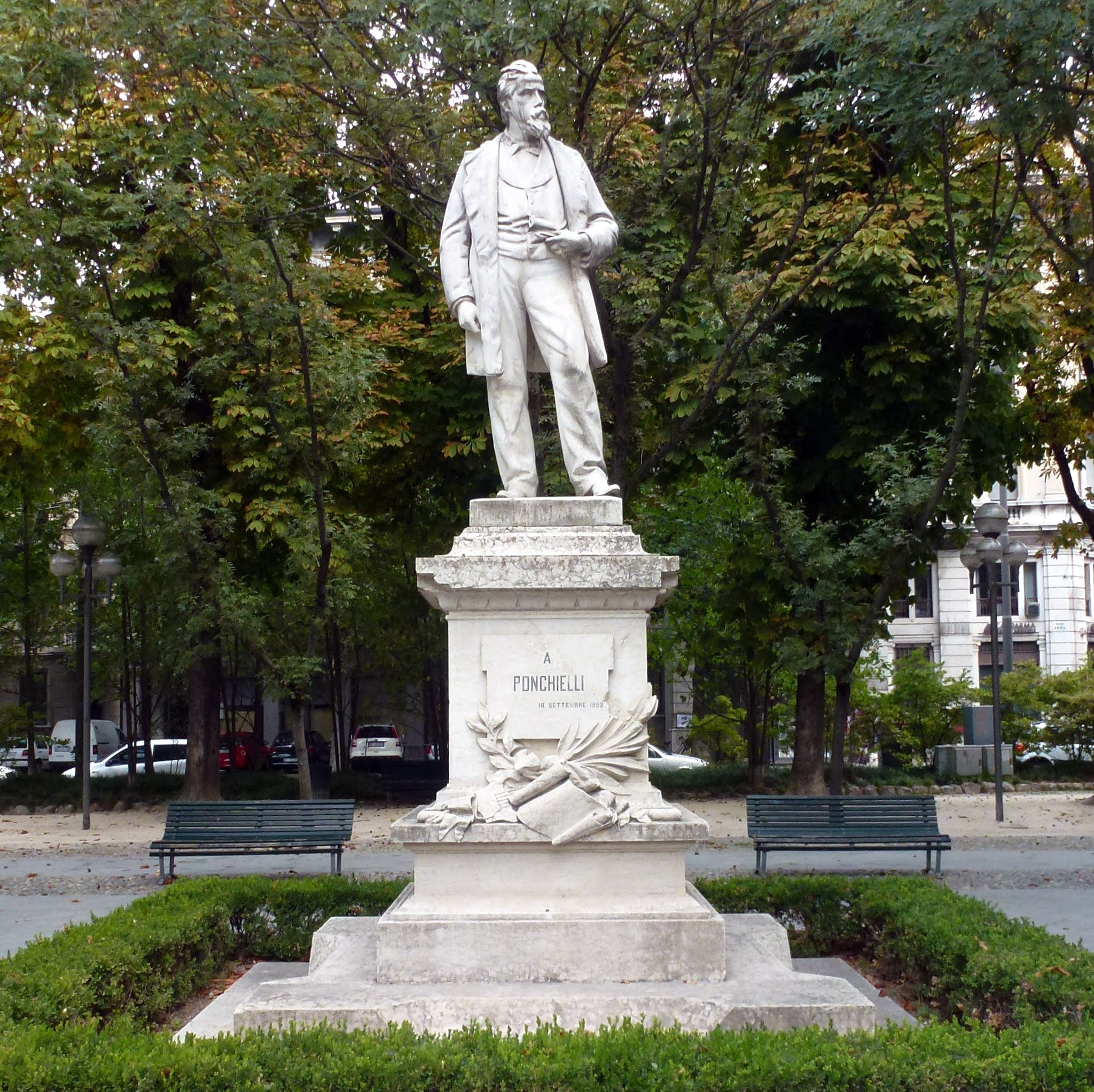 Statua di Amilcare Ponchielli - Italian composer. Cremona, Italia